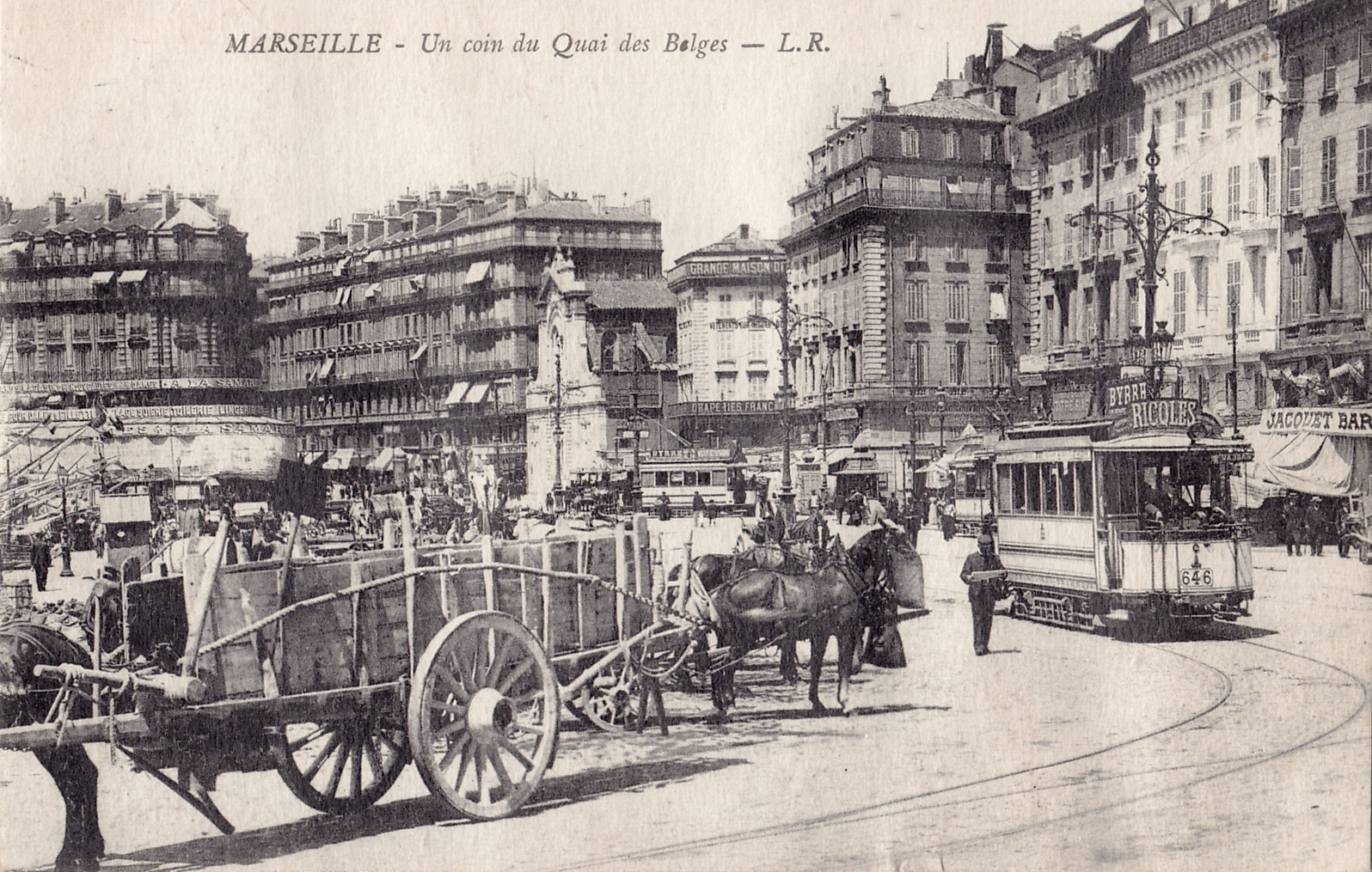 Carte postale ancienne éditée par LR : MARSEILLE - Un coin du Quai des Belges